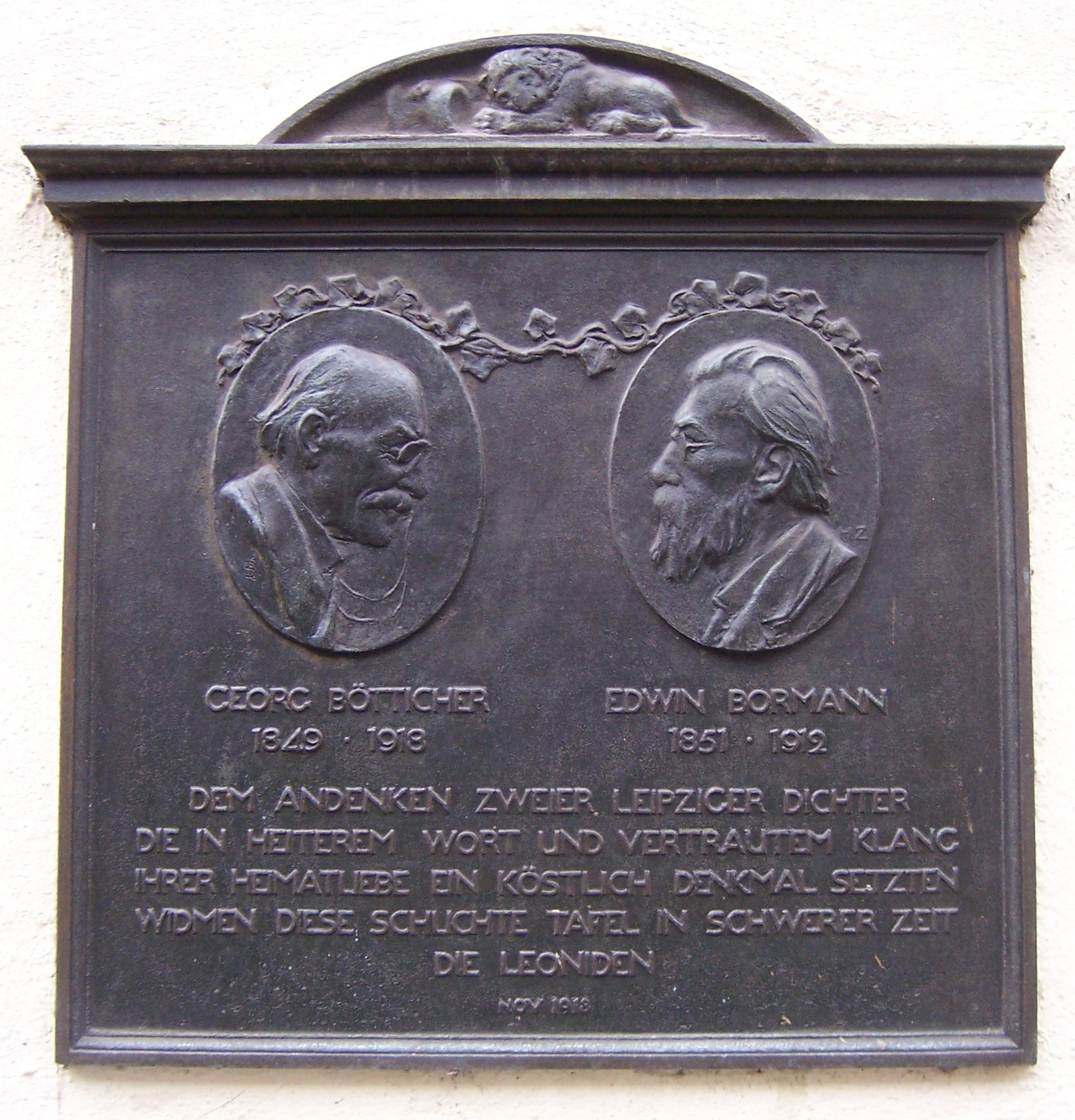 Gedenktafel für die Schriftsteller Georg Bötticher und Edwin Bormann, entworfen von Carl Seffner und Hans Zeißig